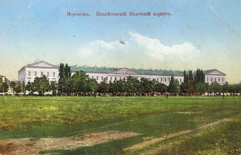 Воронеж, Михайловский кадетский корпус